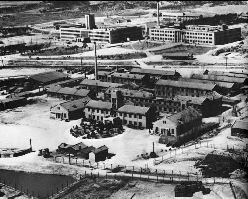 경성광산전문학교와 경성제국대학이공학부